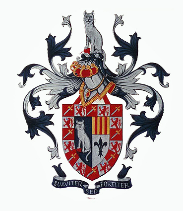 Blason de Muyser Lantwyck